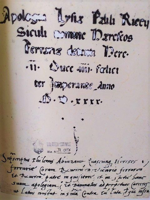 Apologia Lysiae Philaeni Pauli Ricci Siculi Ferrariae nomine haereseos detenti foeliciter imperante Hercule II duce IIII Anno M. D. XXXX